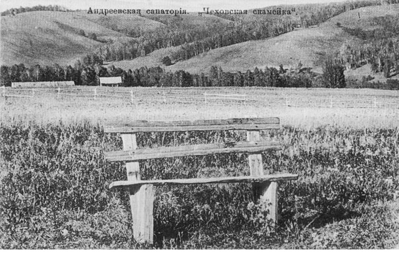 Чехов в Андреевском-санатории, скамейка писателя, 1901 год